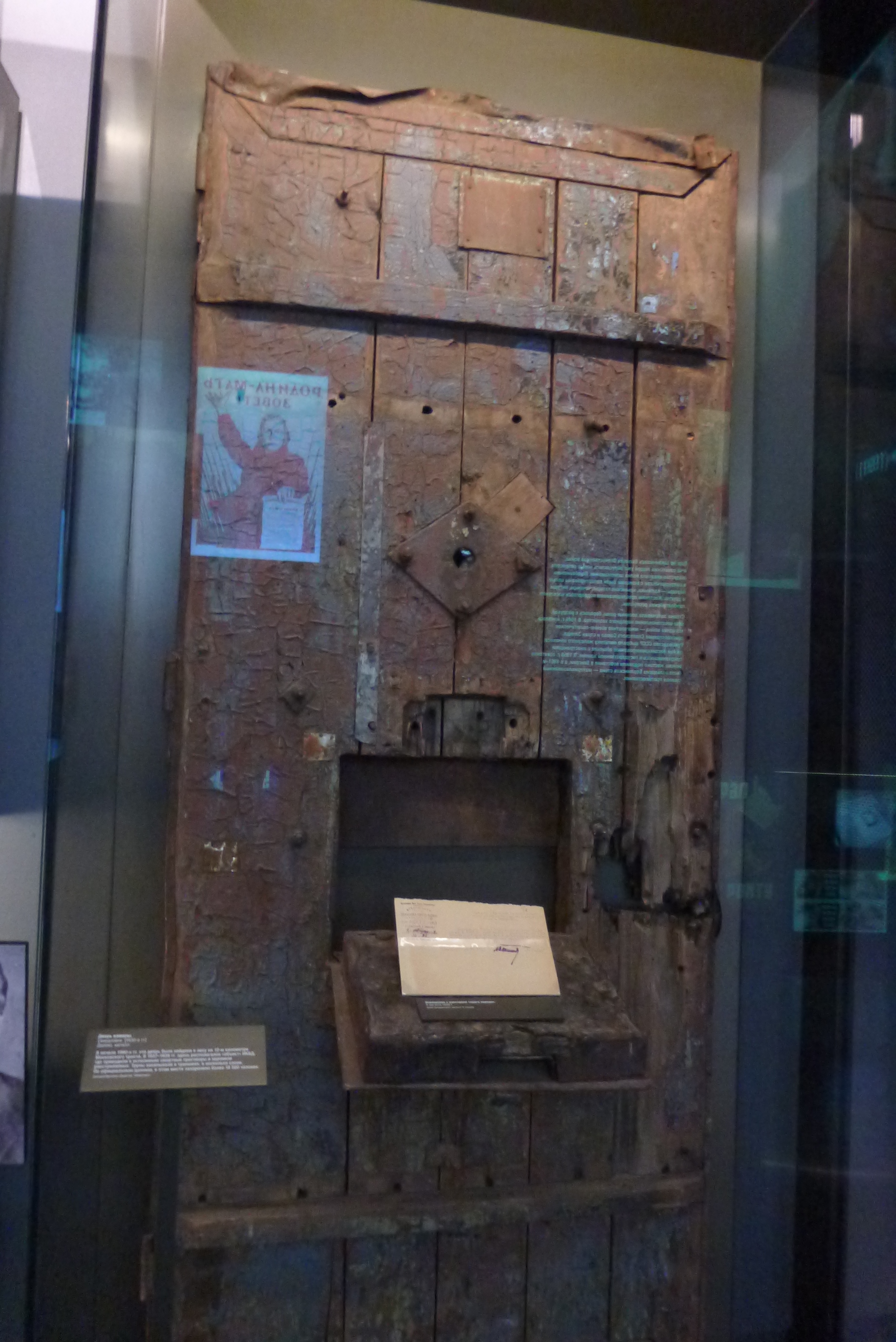 Дверь в камере в Свердловске 1930-е годы. Найдена на 12-м километре Московского тракта. Хранится в Музее Ельцина (Ельцин-центр)